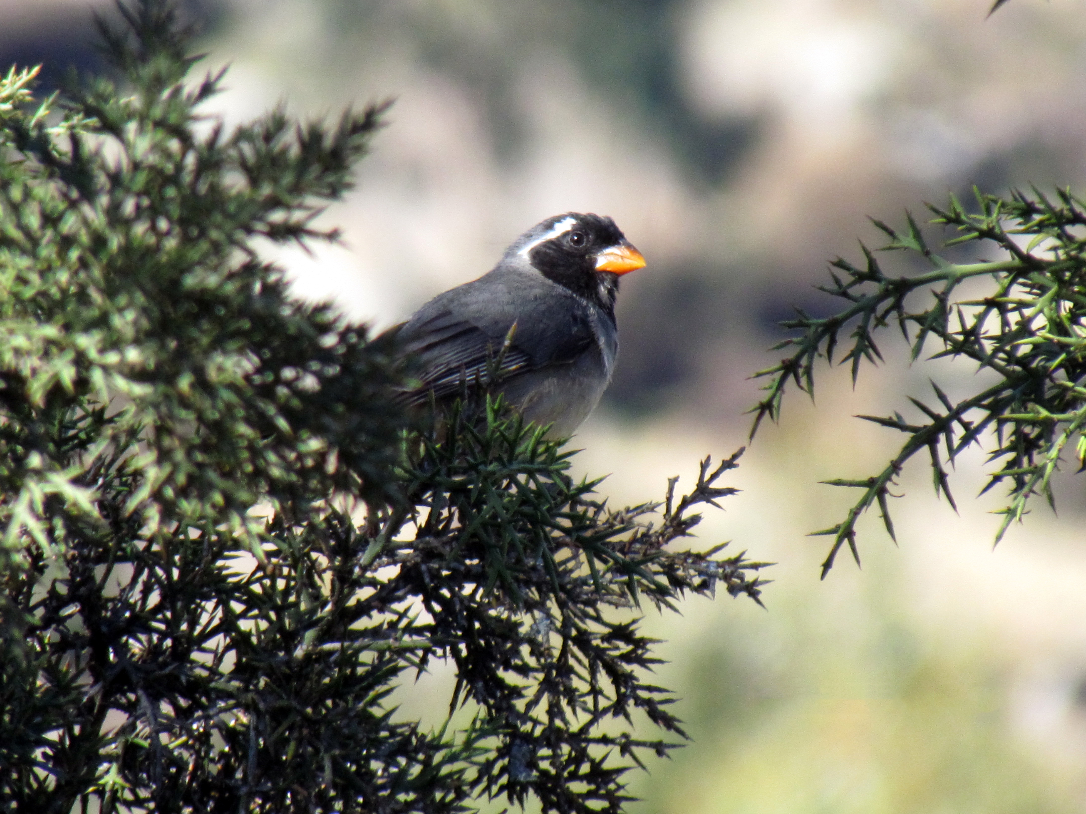 Aves comunes de Aurahua 1